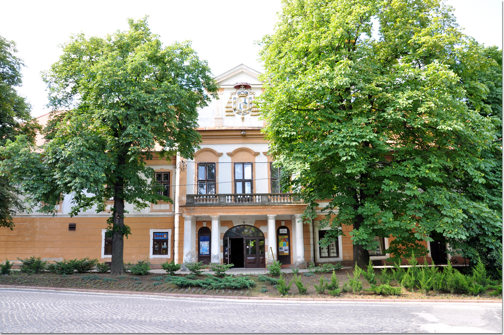 Az aranyosmaróti Migazzi-kastély.